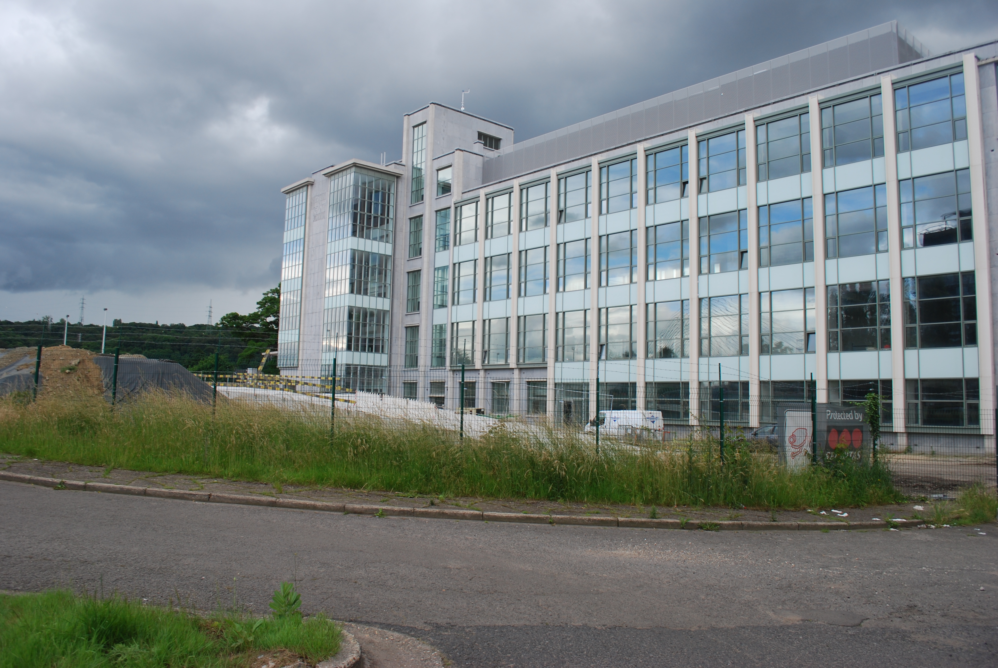 Vue des travaux d'aménagement et de réhabilitation de l'ancien site universitaire du Val Benoît à Liège.